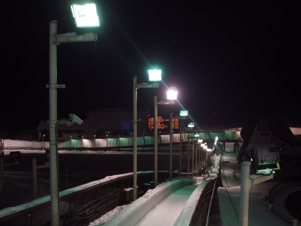 Siguldas trases finišs.